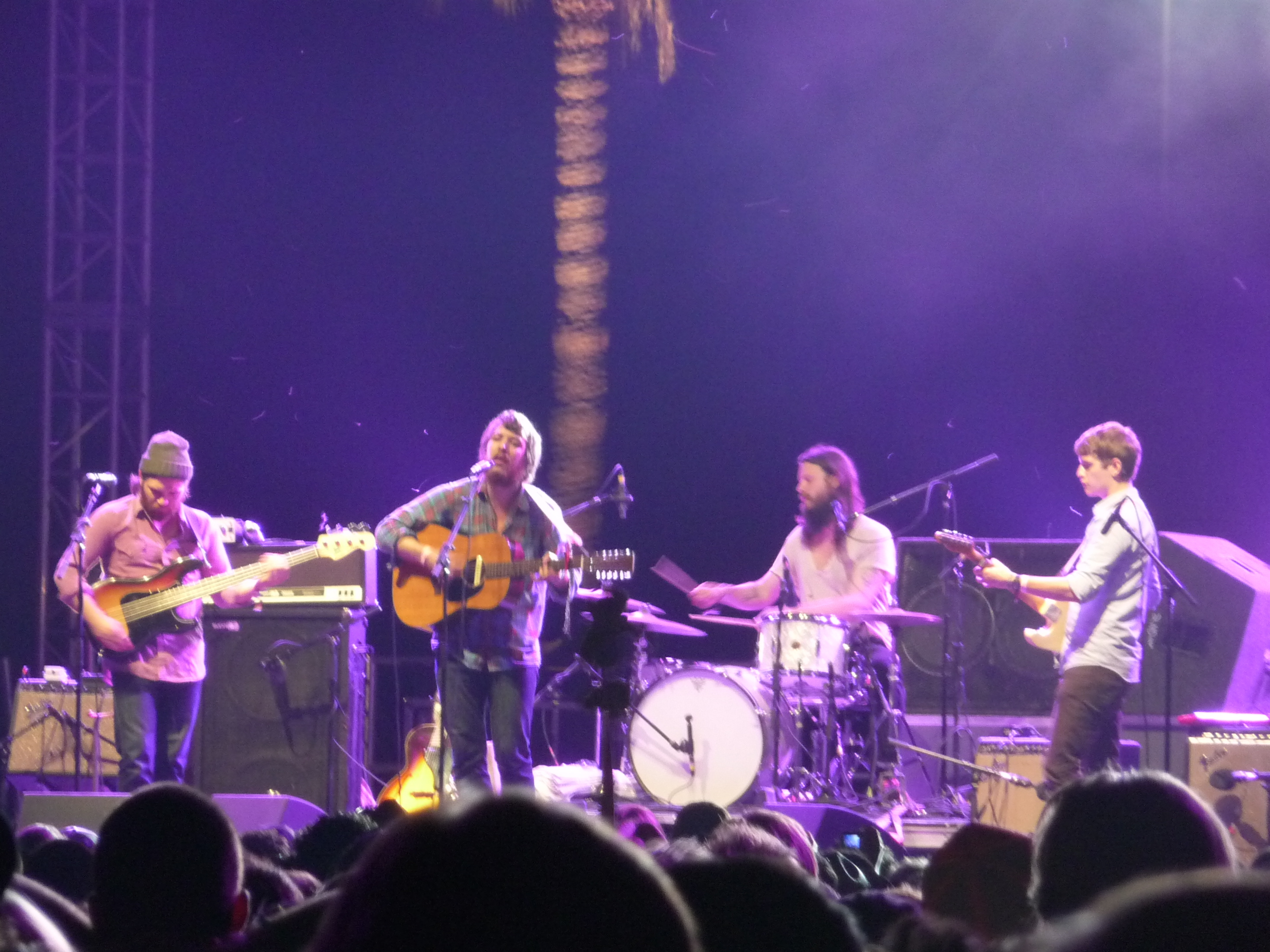 Fleet Foxes @ Coachella Festival 2009